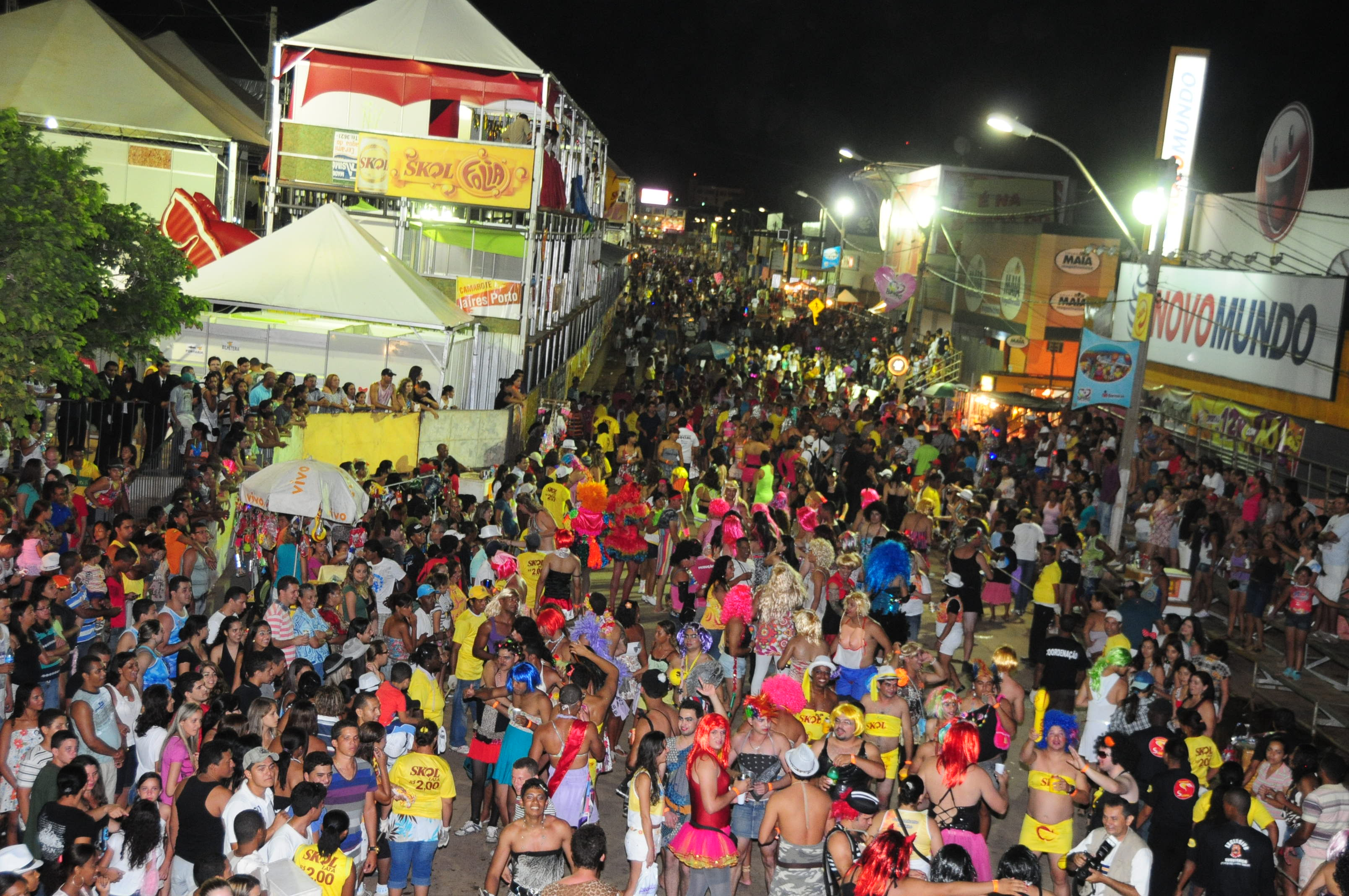 Bloco As Raparigas no Carnaval de Barreiras em (20.02). Foto: Ronaldo Carvalho / Ag A TARDE